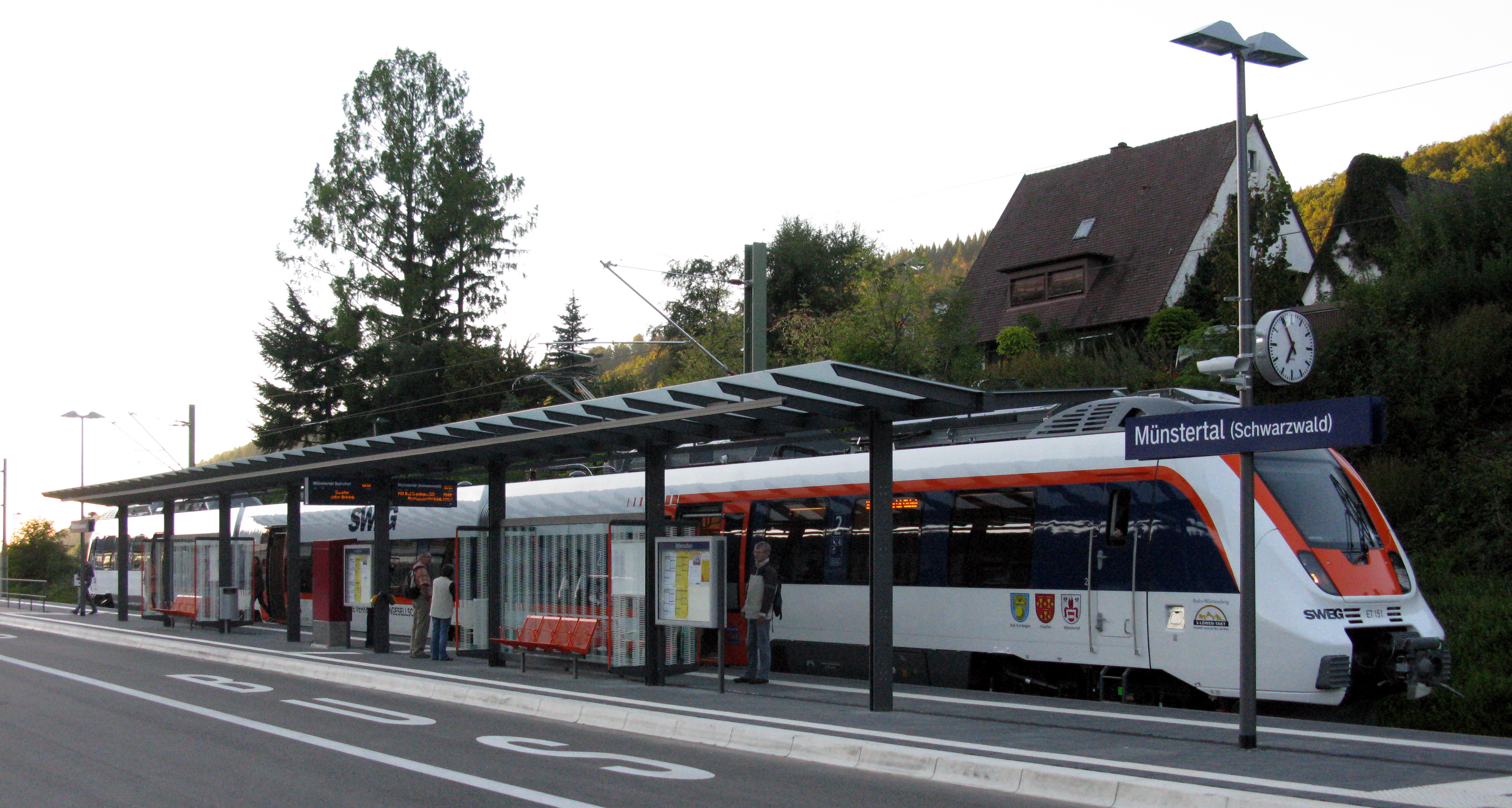 Bombardier Talent 2 der SWEG im Bahnhof Münstertal